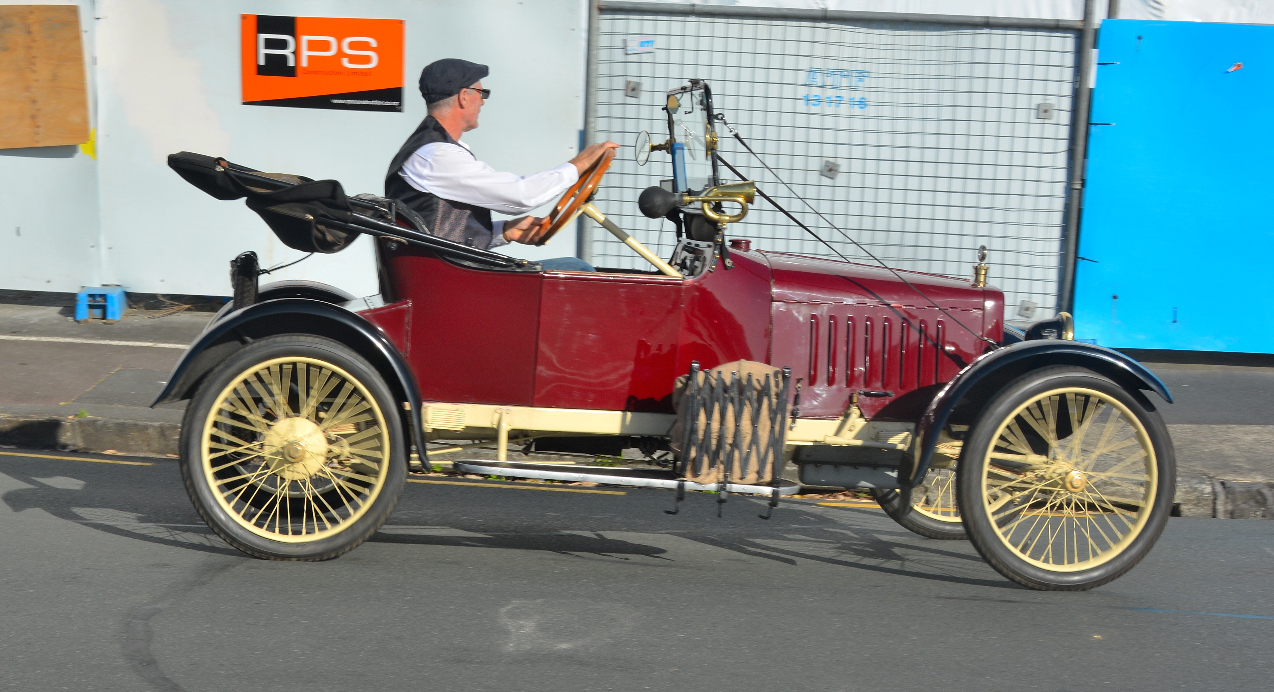 At Devonport,New Zealand